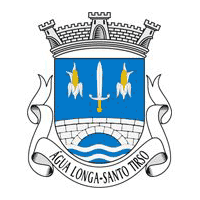 Brasão: escudo de azul, ponte de um arco de prata, lavrada de negro, movente dos flancos e nascente de um pé ondado de prata e azul de quatro tiras; em chefe, espada alçada de prata, empunhada de ouro, entre duas espigas de milho de ouro, folhadas de prata. Coroa mural de prata de três torres.